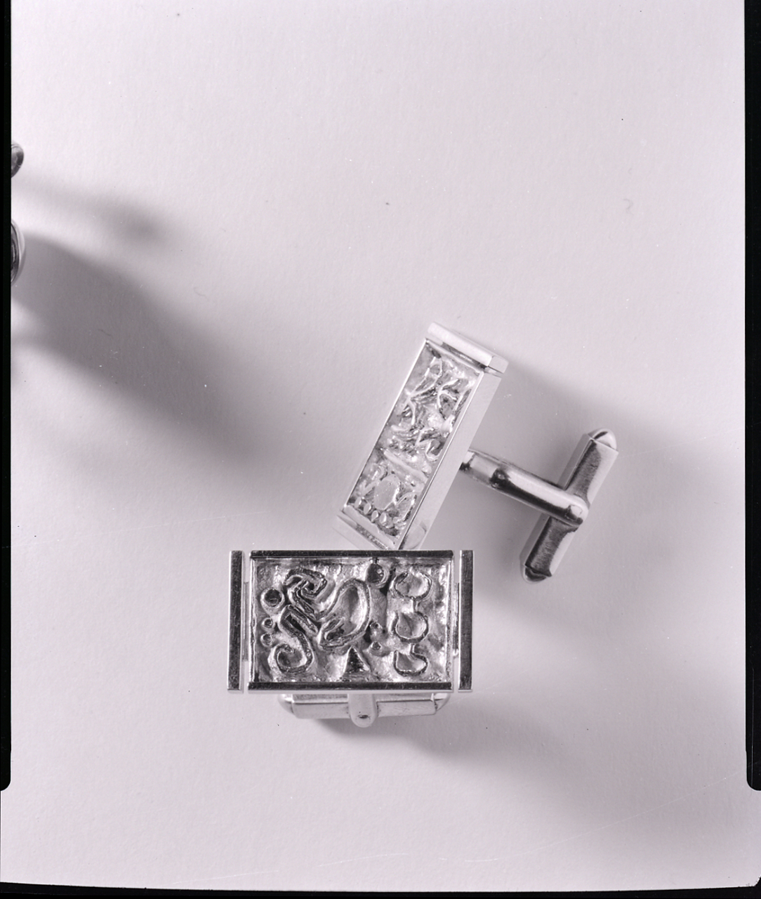 Servizio fotografico : Italia, 1964 / Paolo Monti. - Buste: 6, Fototipi: 5 : Negativo b/n, gelatina bromuro d'argento/ pellicola ; 10x12. - ((Serie costituita da 6 buste sciolte di negativi identificati con i nn.: 10327, 10328, 10329, 10330, 10333, 10334. - La busta identificata con il n. 10333 è vuota. - Fonte: Agenda di Paolo Monti: Monti/ 2/ 6 giugno 1964 - 31 marzo 1966/ 8194-12420 (1964-1966), presso Archivio Paolo Monti